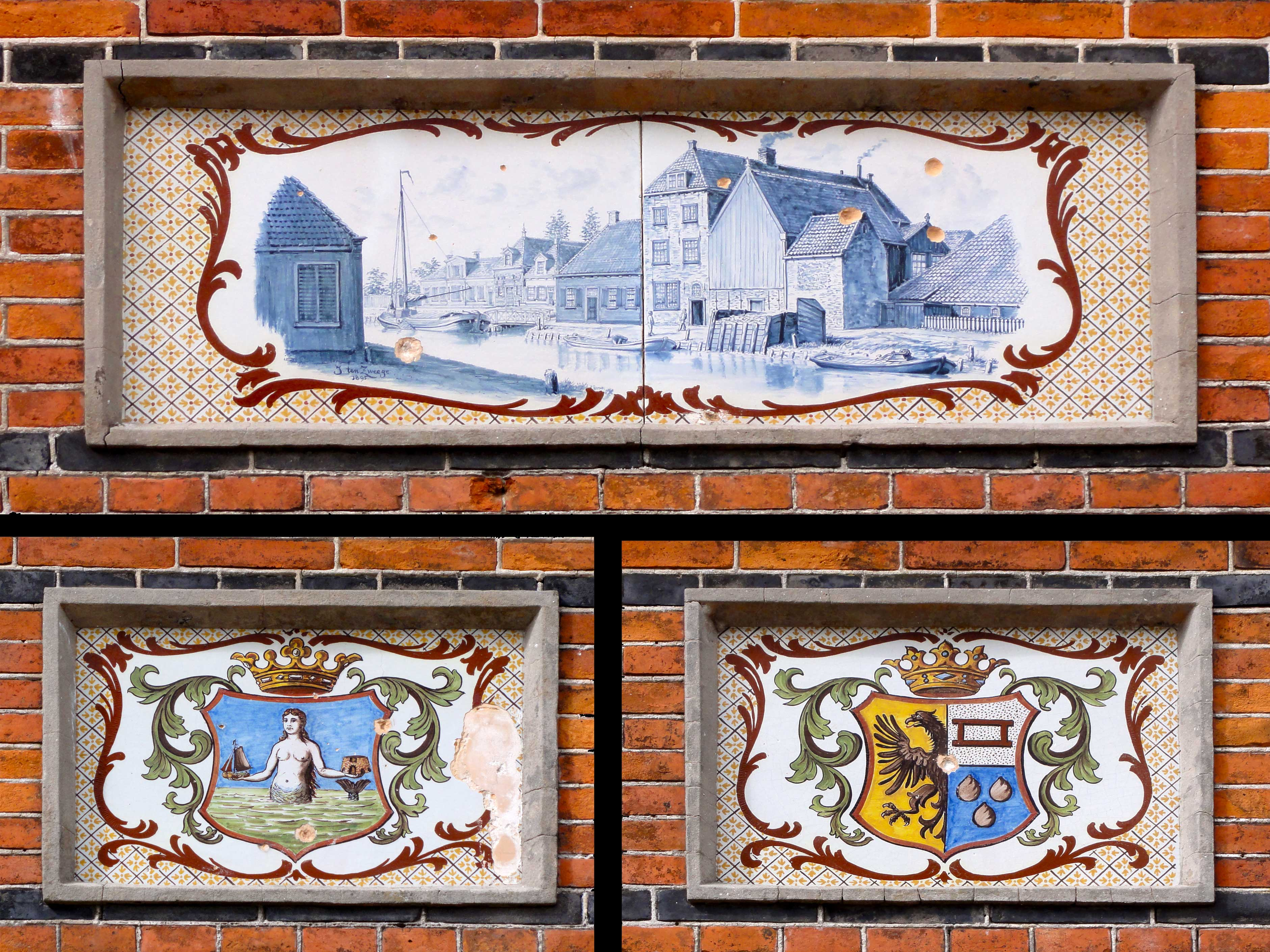 Tegels, Turfmarkt 55 in Makkum (ontwerp Jacobus ter Zweege (1855-1917)